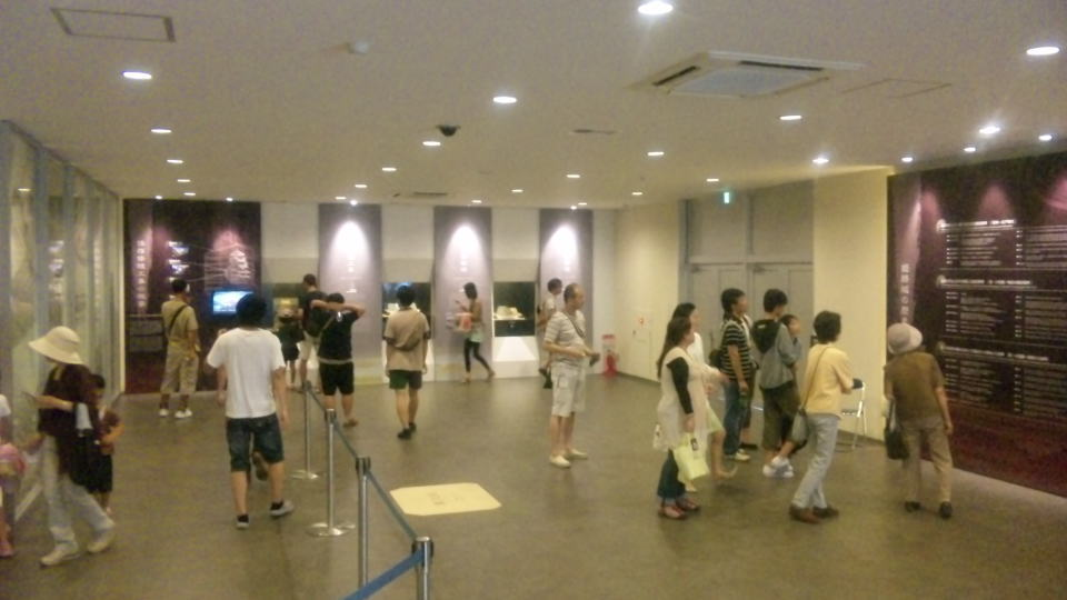 姫路城「平成の修理・天空の白鷺」１階出口付近。